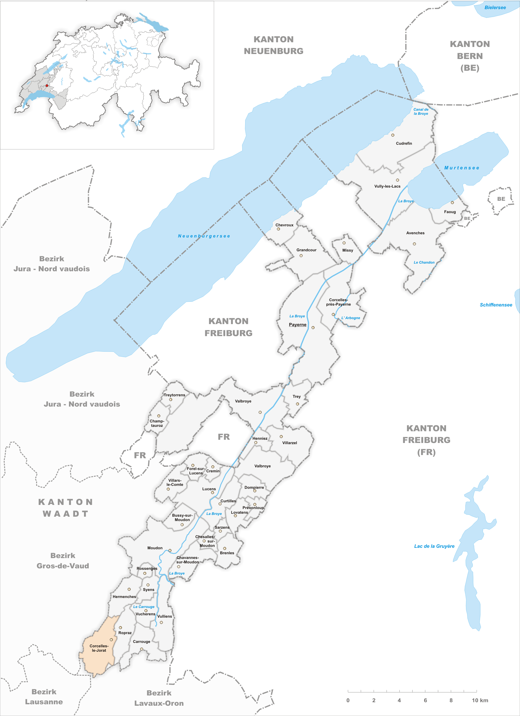 Municipality Corcelles-le-Jorat